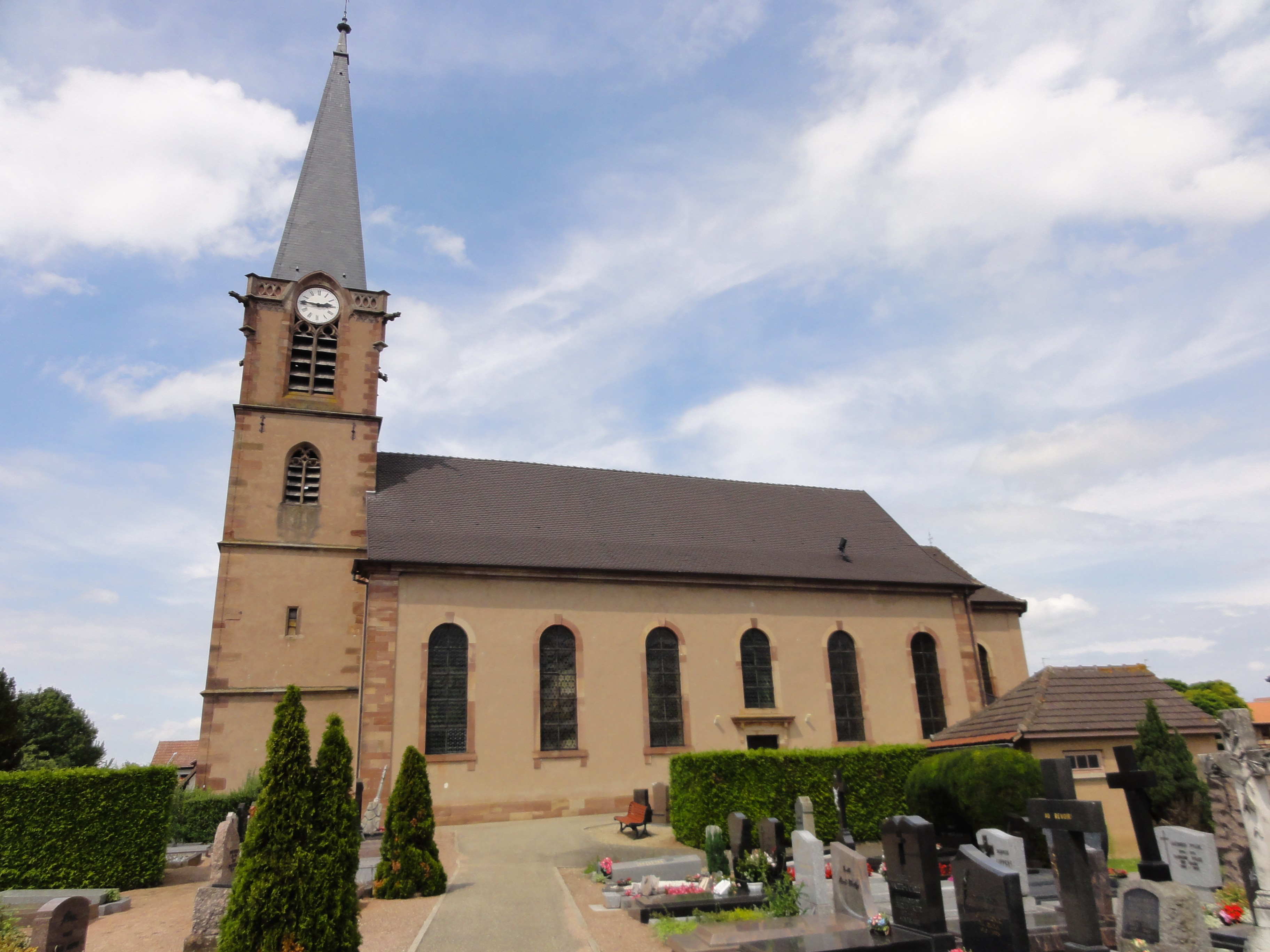 Alsace, Bas-Rhin, Église protestante d'Eckbolsheim (IA67007145).